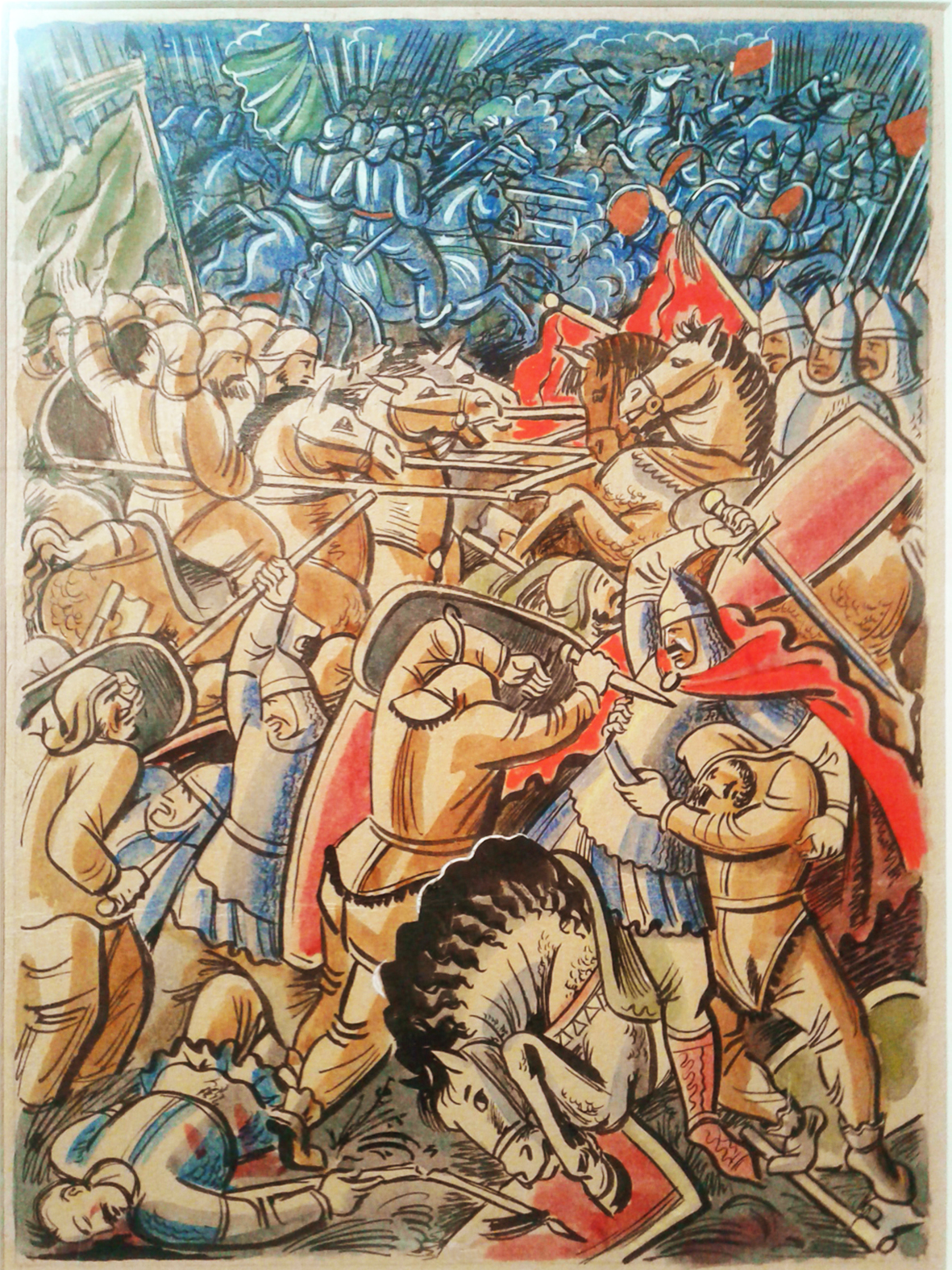 Ескіз ілюстрації до «Слова о полку Ігоревім». Папір, акварель, гуаш. 1928. Національний художній музей України